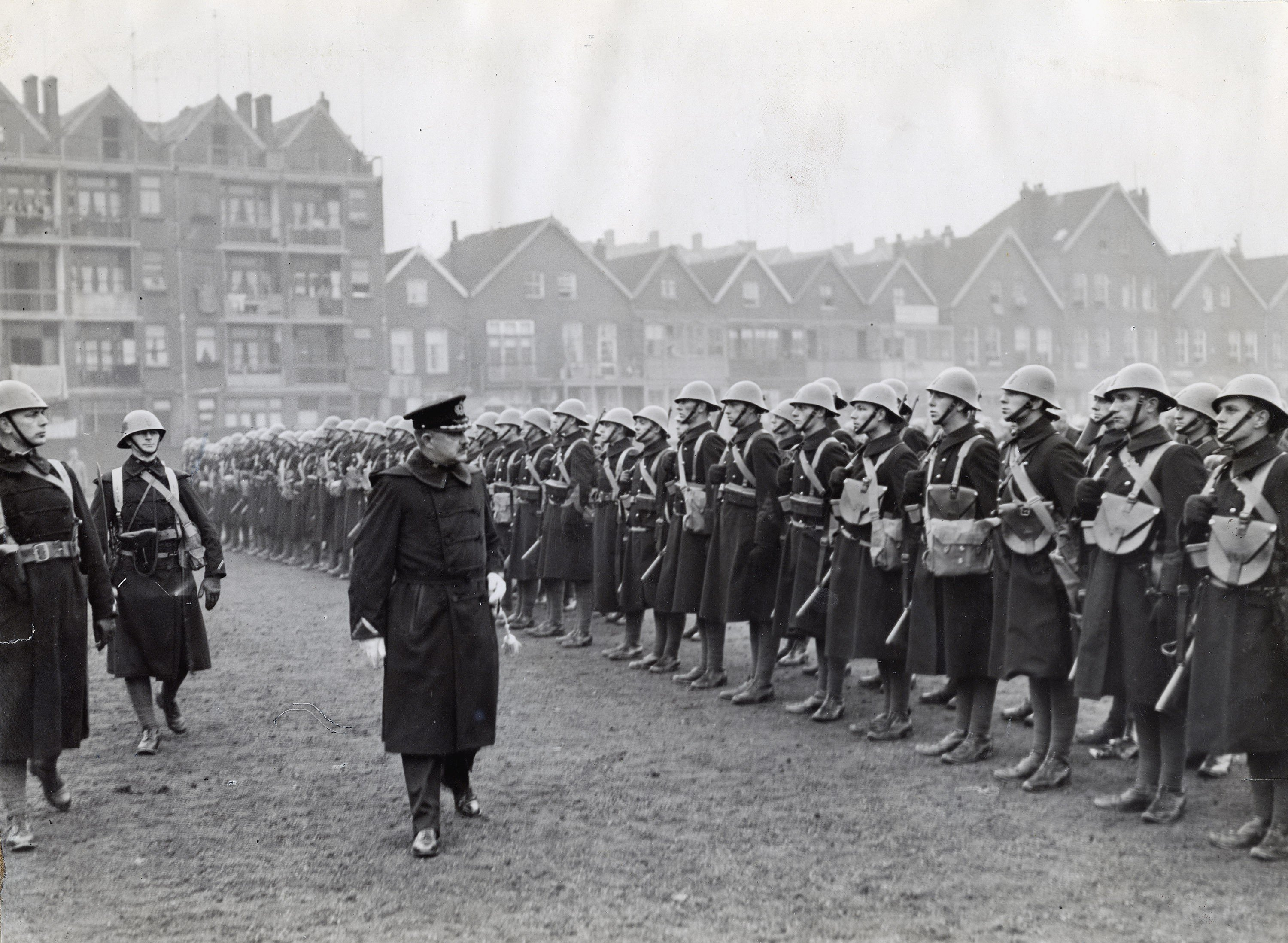 Nederlands contingent Saartroepen. Op het Schuttersveld te Crooswijk worden de vertrekkende mariniers geïnspecteerd door kolonel der mariniers C.J.O. Dorren, chef Korps Mariniers. Links de detachementscommandant, kapitein der mariniers M.R. de Bruijne met daarachter kapitein der mariniers J.A.J. de Bruin, de opvolgend commandant. Ter voorkoming van onlusten tijdens de volksstemming maakte de Saartroepen, circa 250 mariniers, deel uit van een internationale troepenmacht. De troepen waren van 25 december 1934 tot 16 februari 1935 in het Saargebied aanwezig.